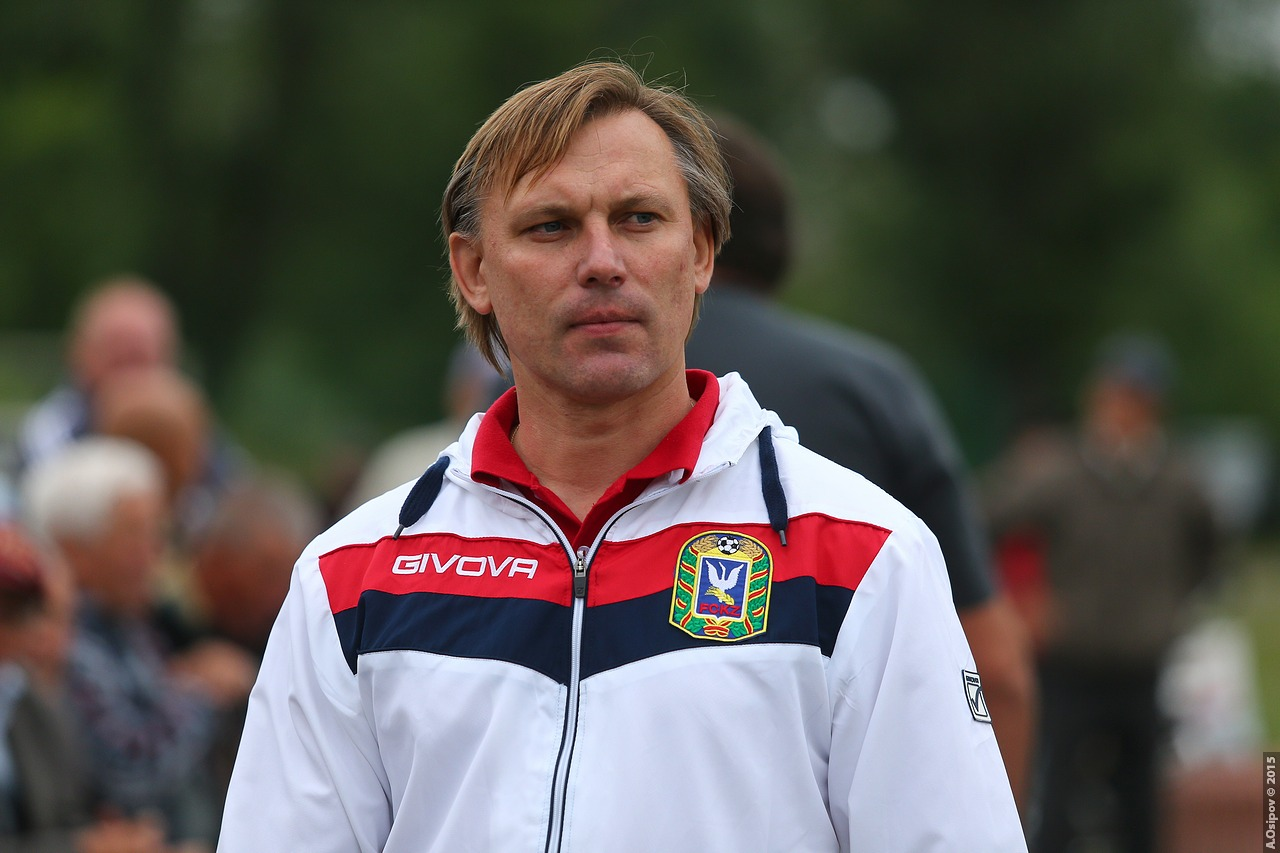 18.06.2015 Чемпионат Украины среди аматоров. Колос (Зачепиловка) - Балканы (Заря) - 0:0 «Колос» (Зачепиловка): Антоненко, Кучук (Нерубенко, 61), Васильев, Билык, Цапий, Михайлюк, Жданов (к), Тарасов, Батусов, Дяченко (Воробей, 79), Шарко. Запасные: Давыдов, Кателин, Котенко, Бодня. «Балканы» (Заря): Паламарчук, Д.Пархоменко, Саламаха, Ильницкий, Пенов (Полтавец, 90+4), Гаврилюк, К.Пархоменко, В.Златов (Е.Райчев, 70), Урсуленко, А.Райчев (к), В.Кириллов (Лазаренко, 81). Запасные: Потароченко, А.Кириллов, Голубев, Куртов. Предупреждения: Тарасов, 44; Шарко, 79 – В.Златов, 23; В.Кириллов, 63; Гаврилюк, 67; Пенов, 87. Судьи: А.Омельченко (Славянск), Д.Сердюк (Полтава), В.Попков (Волноваха). Четвертый арбитр – А.Афанасьев (Норцовка, Харьковская область). Наблюдатель арбитража – В.Головко (Днепропетровск).